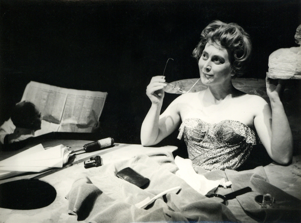 Samuel Beckett, O, lepi dnevi, Eksperimentalno gledališče. Na fotografiji: Štefka Drolc (Winnie).